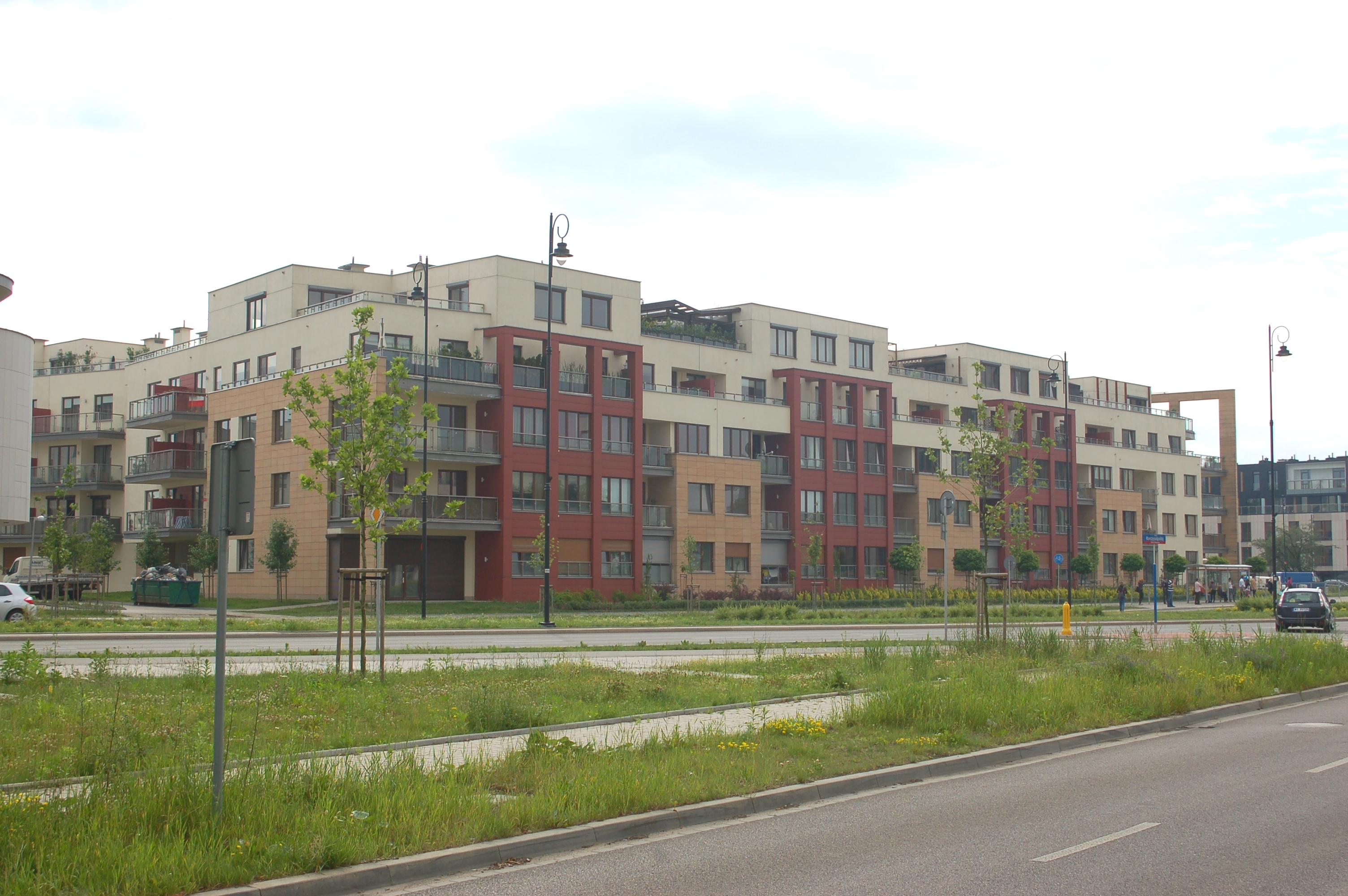 Miasteczko Wilanow